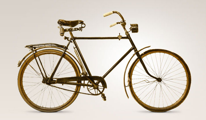 Kalkhoff Historie